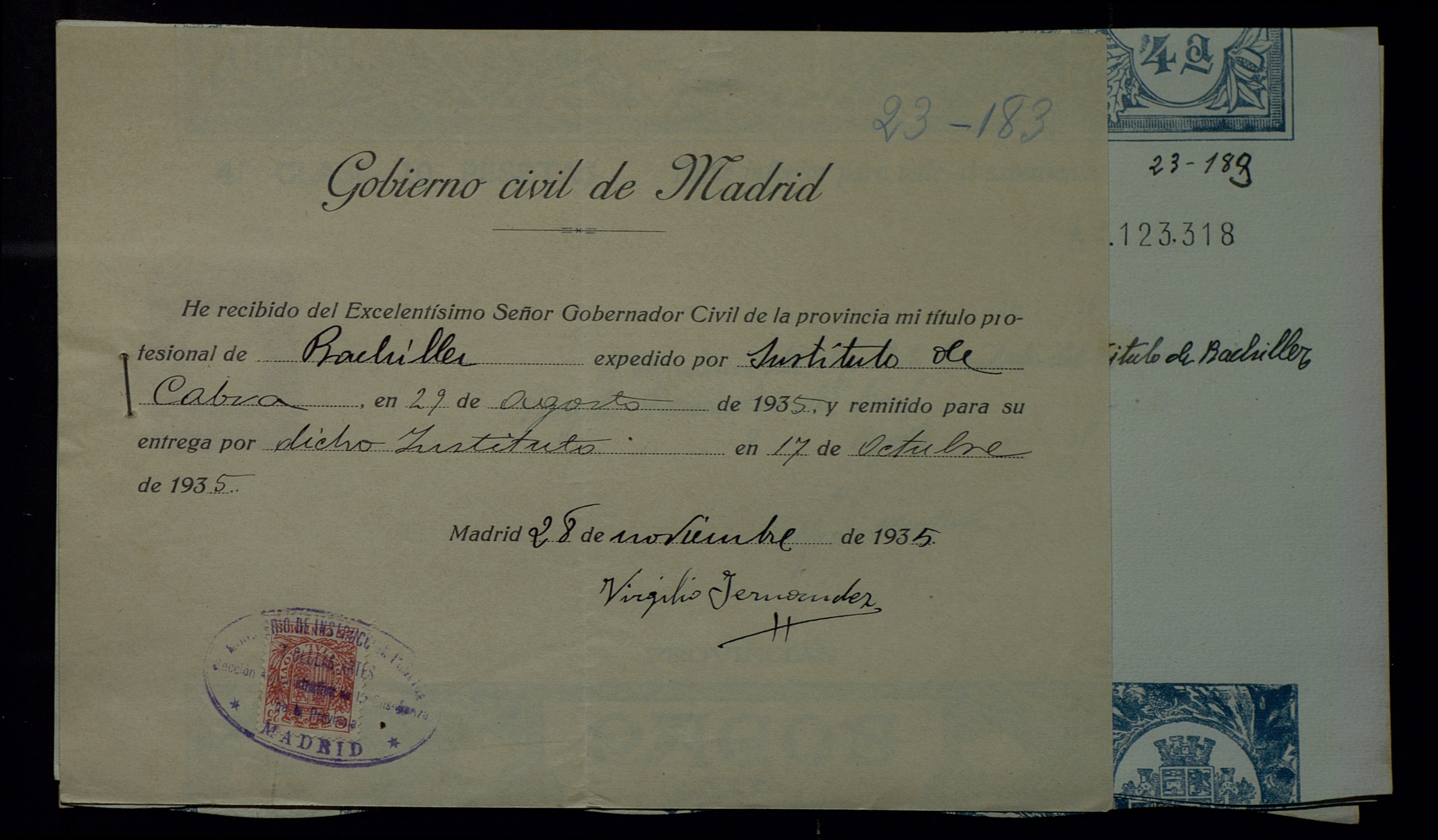 Acuse de recibo del título de Bachiller expedido por el Instituto Aguilar y Eslava de Cabra en 1935 y recogido por el alumno ese año